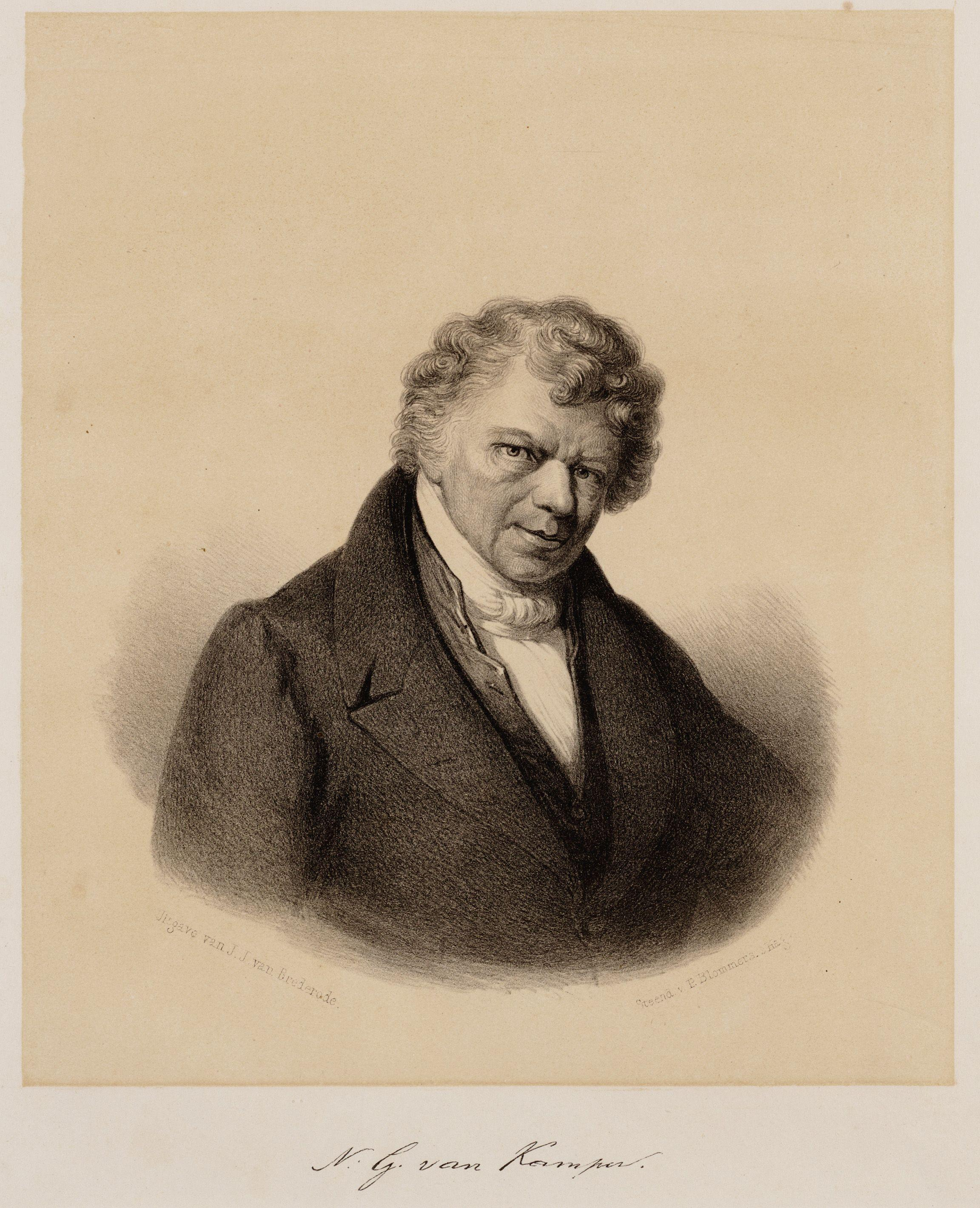 Beschrijving Nicolaas Godfried van Kampen (15-05-1776 / 15-03-1839) Geschiedschrijver. Documenttype prent Vervaardiger Blommers, P. Brederode, J.J. van (uitgever) Collectie Collectie Stadsarchief Amsterdam: tekeningen en prenten Inventarissen Afbeeldingsbestand 010097008710